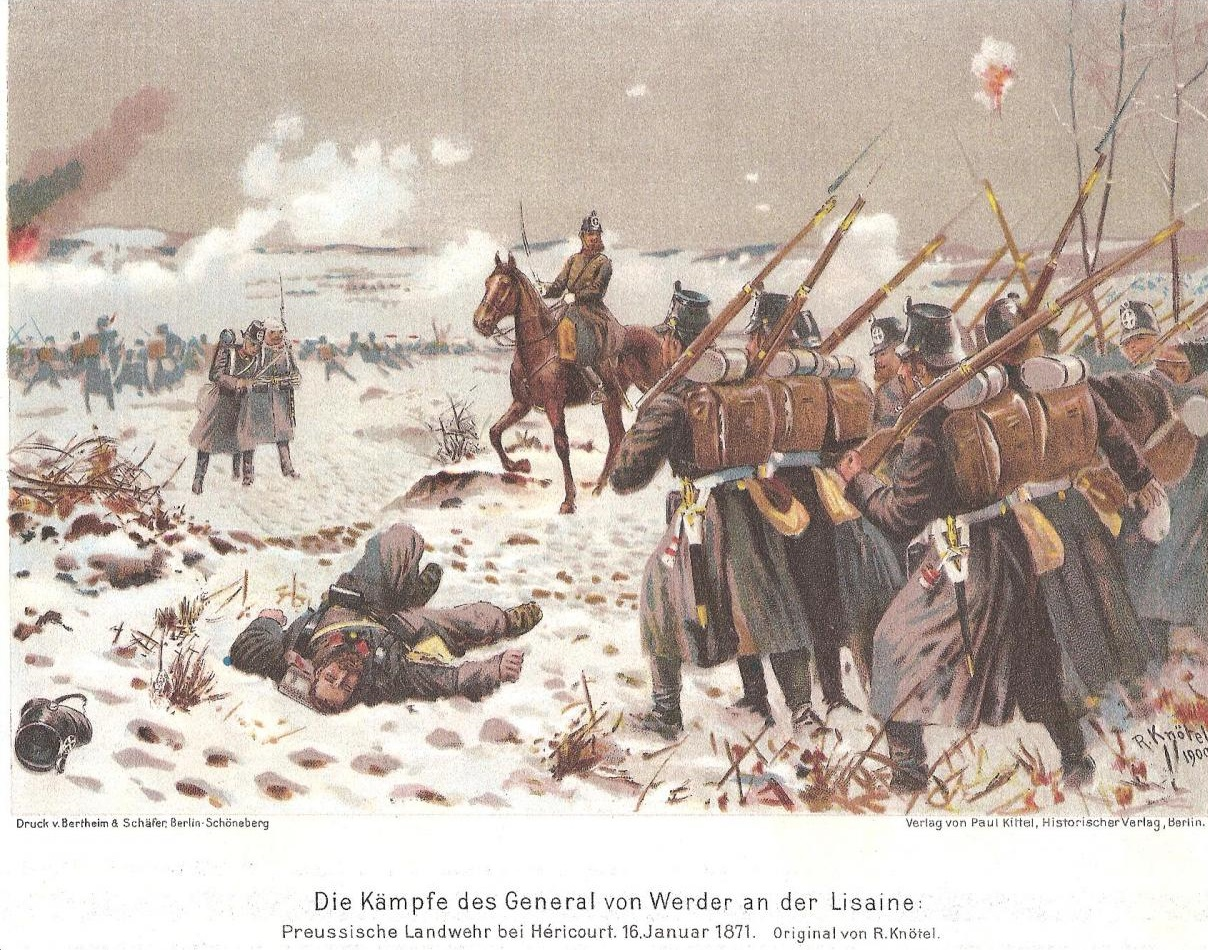 Bataille de la Lizaine (1870-1871) ; camp du général August von Werder, l'armée prussienne à Héricourt.